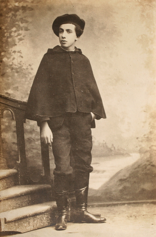 Guillonnet lors de sa 1ère exposition au salon Blanc et Noir en 1886